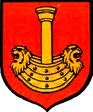 Herb Łopienna (gmina Mieleszyn)